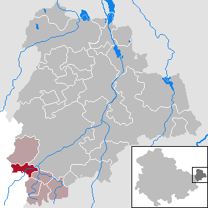 Posterstein in Thuringia - District Altenburger Land